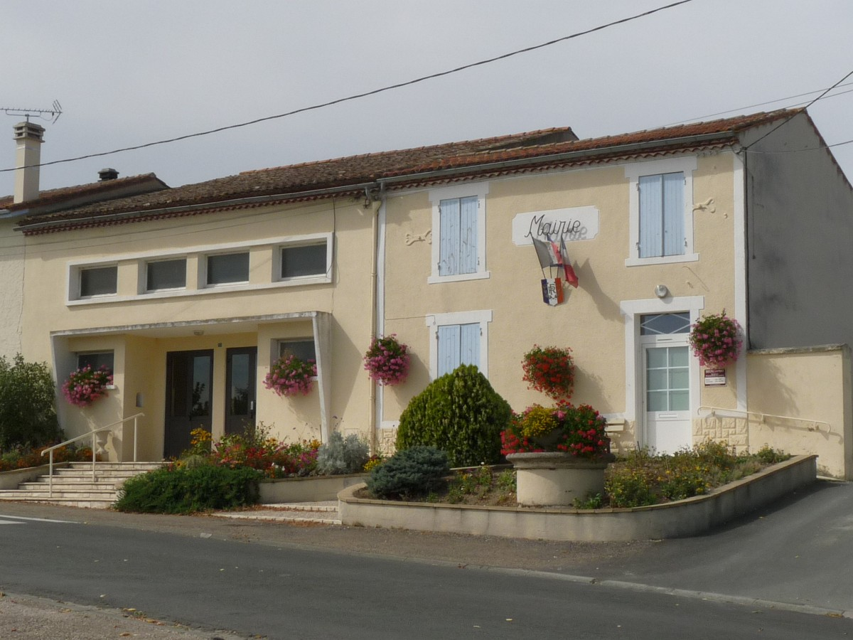 Mairie de St-Georges-des-Agoûts, Charente-Maritime, France